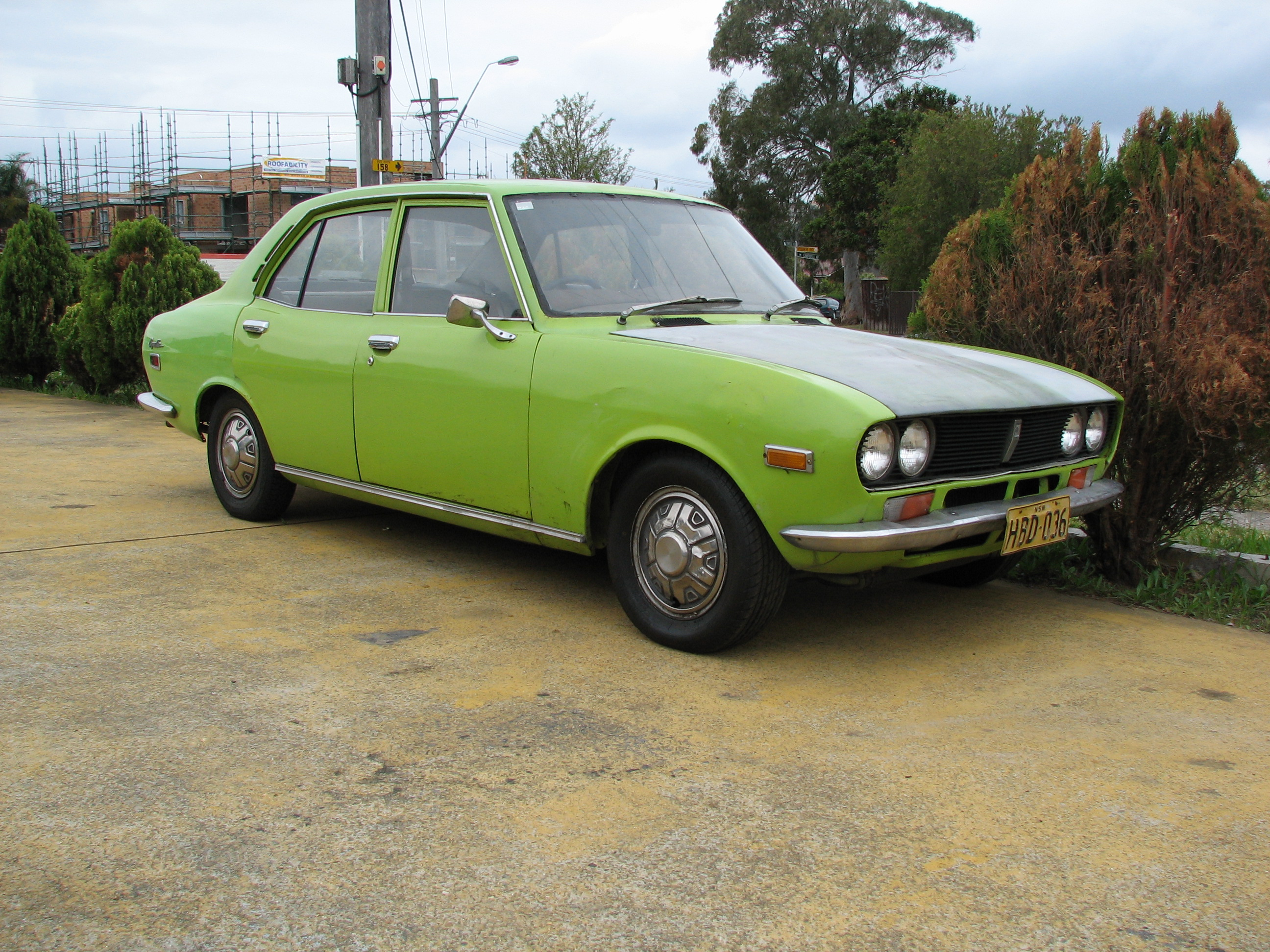 Mazda Capella